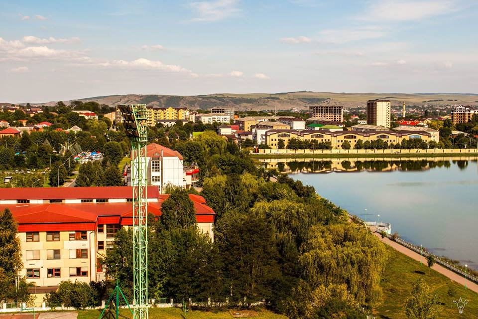 Городской пруд города Назрань, ЦАО